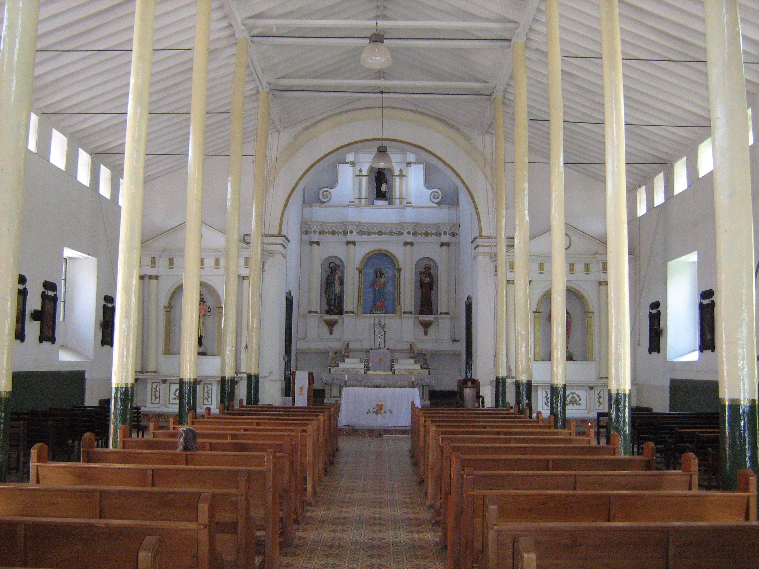 Capilla de María Auxiliadora en el municipio de Barbosa, Antioquia, Colombia.